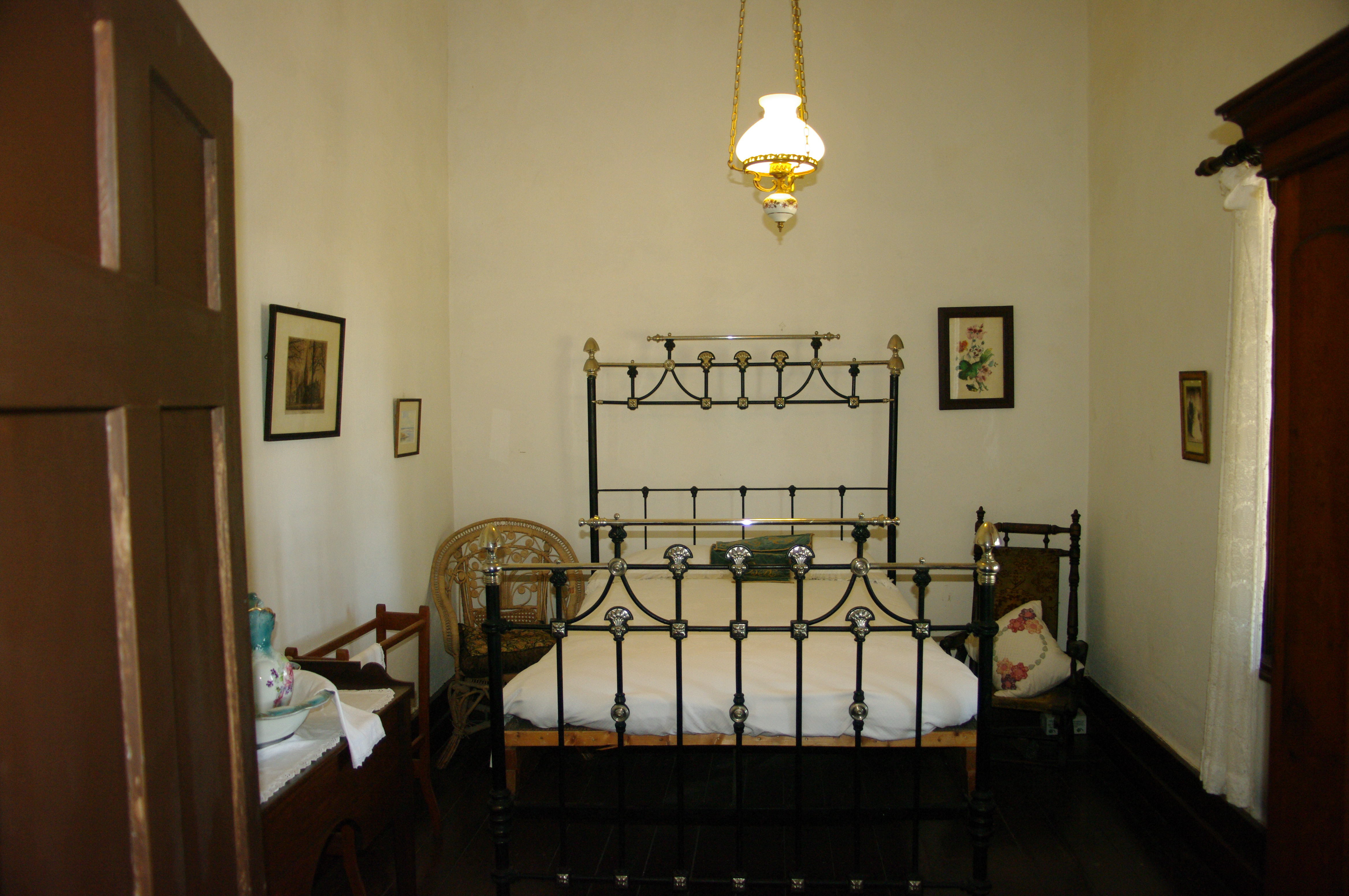 Wonnerup House bedroom